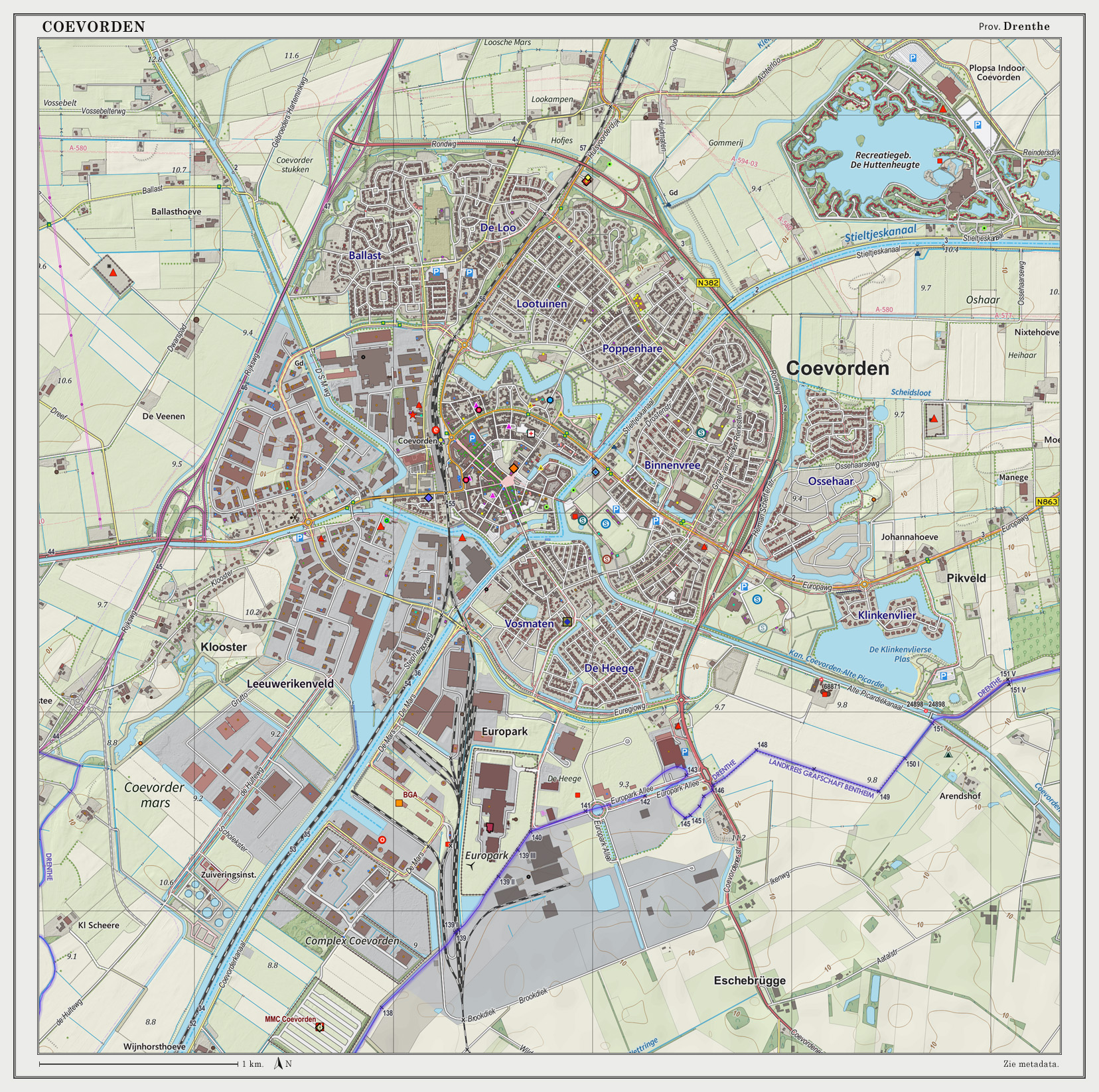 Topografische kaart van Coevorden (woonplaats). Resolutie: 300 pixels/km. Kaartbeeld samengesteld uit de open geodata van de Top10NL en Top25namen (Basisregistratie Topografie, Kadaster), Creative Commons BY licentie. Gebouwvlakken uit open geodata BAG extract. Wegen uit de OpenStreetMap. Reliëfschaduw uit de Actuele Hoogtekaart AHN2. Samenstelling en kleurenschema: Jan-Willem van Aalst, met QGIS2. Zie ook de Legenda.